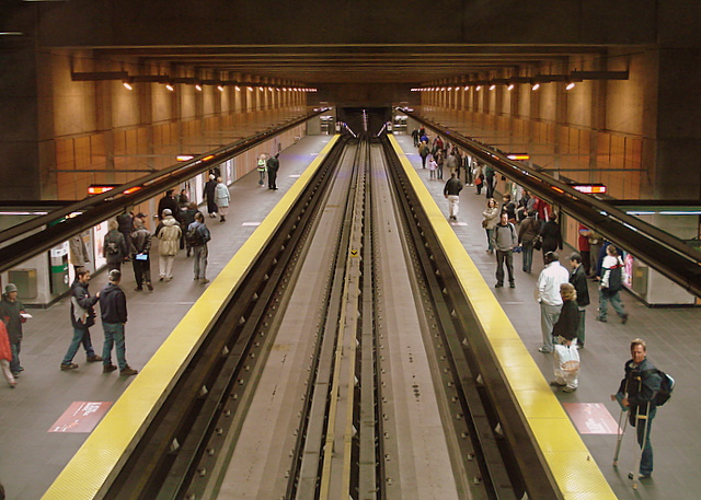 Station de métro Cartier à Laval / Cartier metro station in Laval